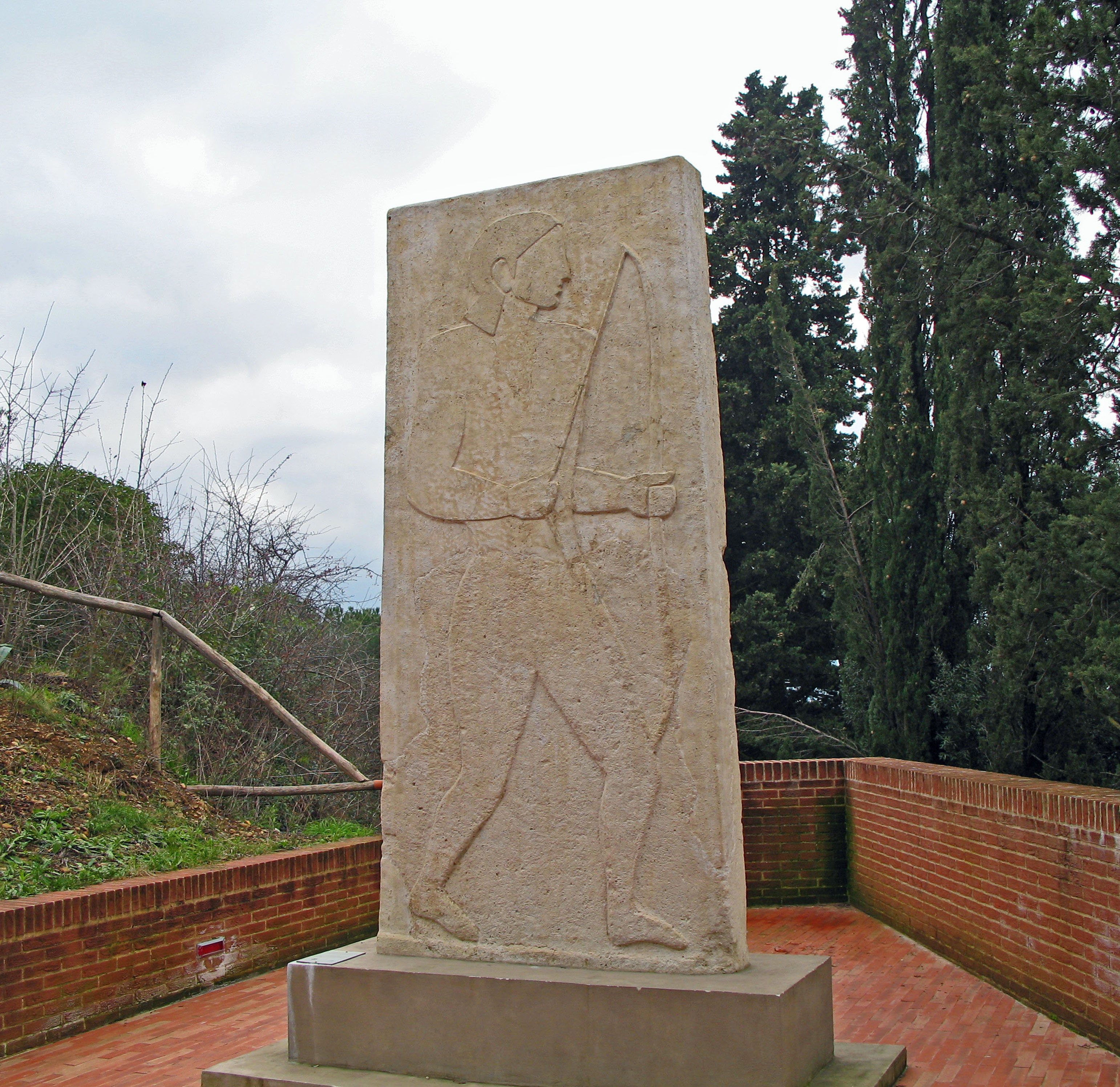 stele etrusca dell'arciere (Copia)